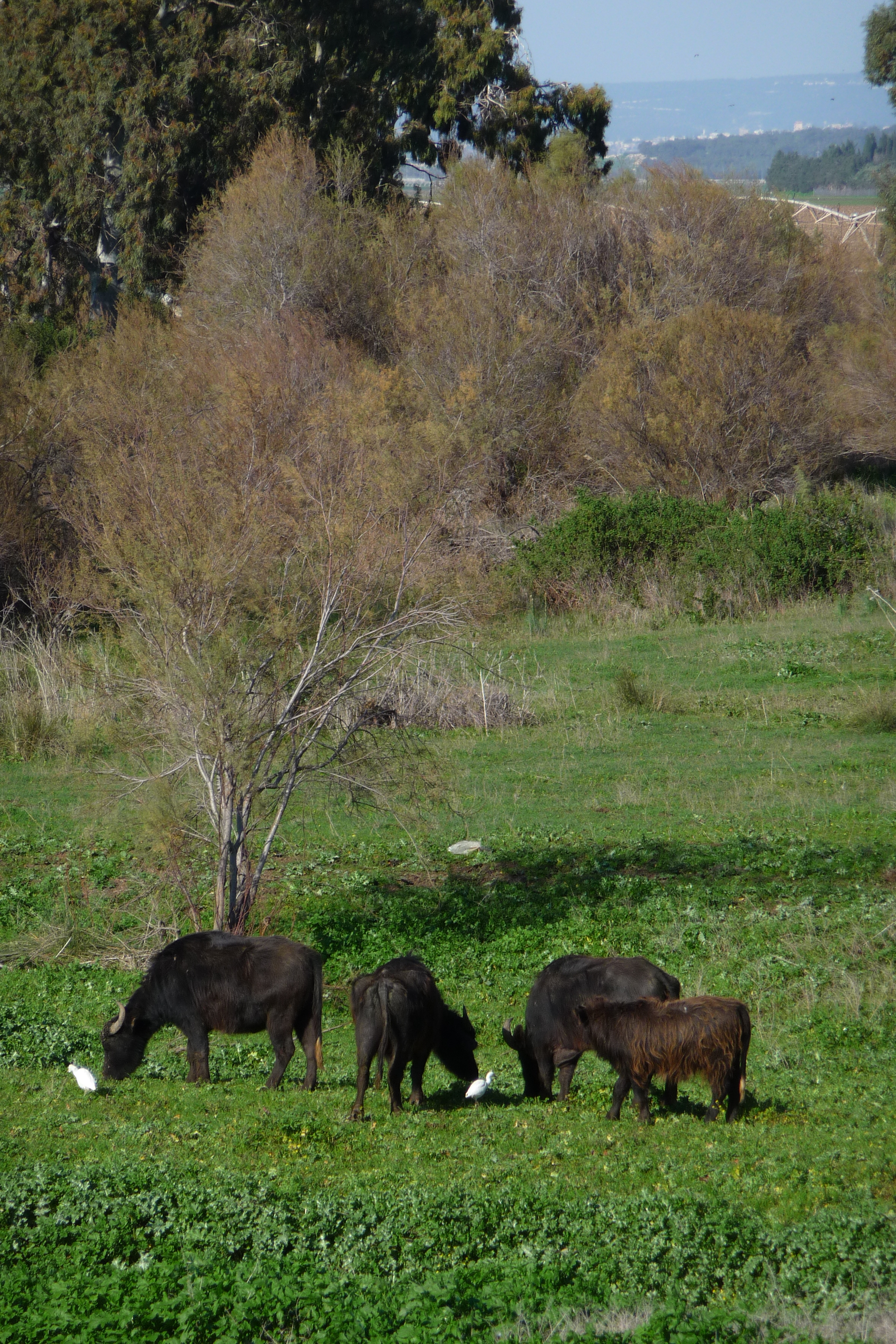 שמורת טבע בעמק זבולון, מזרחית לקריית ביאליק. השמורה כוללת הן את המעיינות והביצות המהווים את מקורו של נחל נעמן והן את האתר הארכאולוגי תל אפק. השמורה הוכרזה ב-1979 והיא משתרעת על פני 660 דונם. ב-1996 הוכרה השמורה כ"אתר רמסר" בהתאם לאמנת רמסר לשימור ולפיתוח בר-קיימא של בתי גידול לחים.